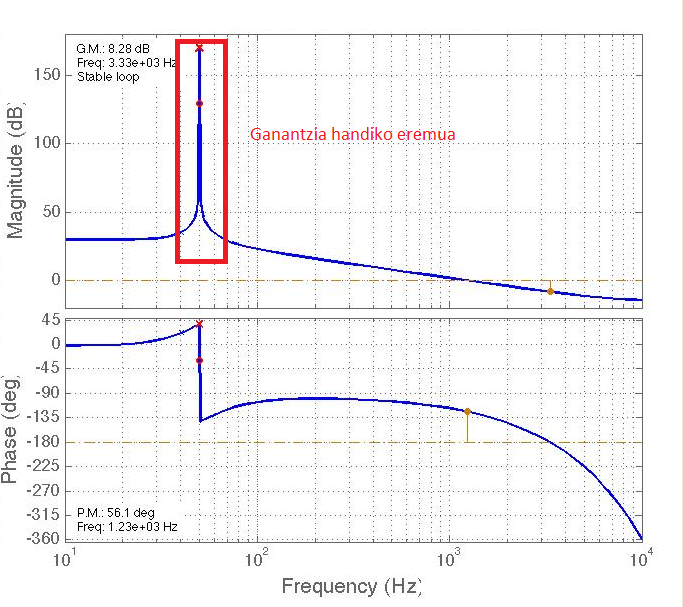 Pi erresonante baten Bodea